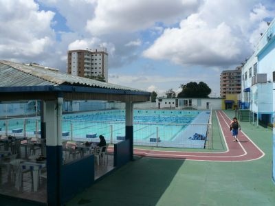 Piscina Olímpica do Parque Aquatico do Nacional Futebol Clube de Manaus